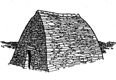 Poustinia celtique